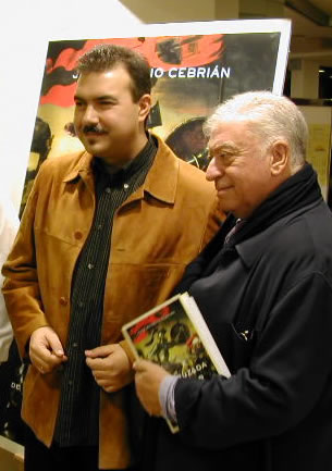 El albaceteño Juan Antonio Cebrián (izquierda) y el granadino Tico Medina (derecha). Presentación del libro de Juan Antonio Cebrián "La Cruzada del Sur", en la sede madrileña de Ámbito Cultural de El Corte Inglés